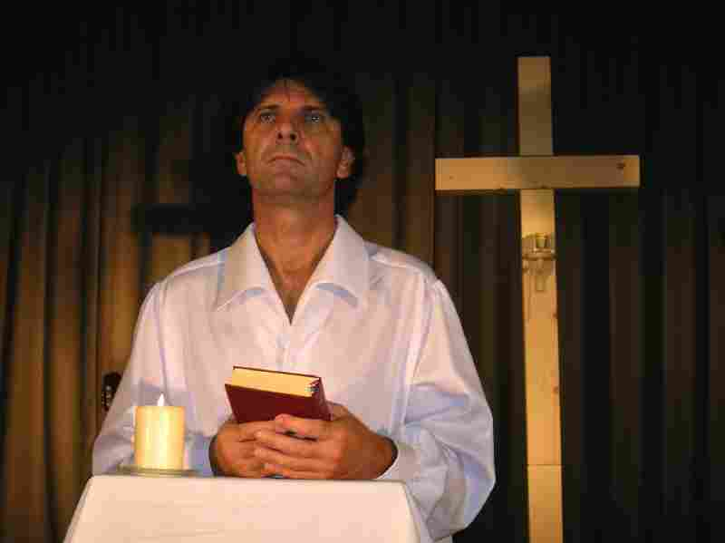 Pelsőczy László a Sorsidéző – Ezeréves magyar Ámen című önálló műsorát adja elő Esztergomban